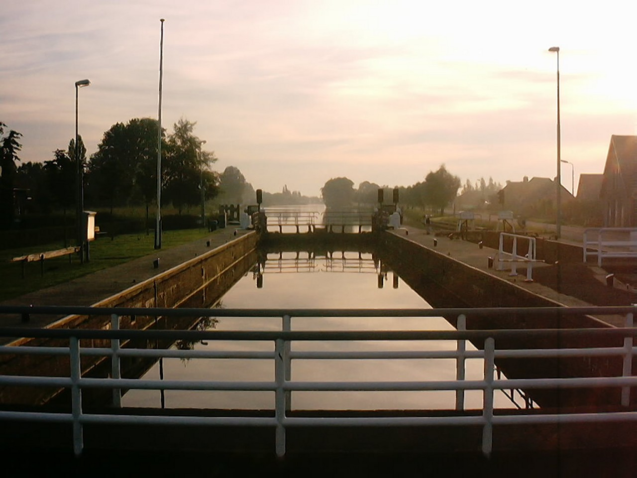 Sluiskolk Tolhuissluis